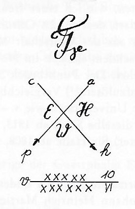 Zirkel und Bundeszeichen der Westfälischen Landsmannschaft in Erlangen (1794–1809).